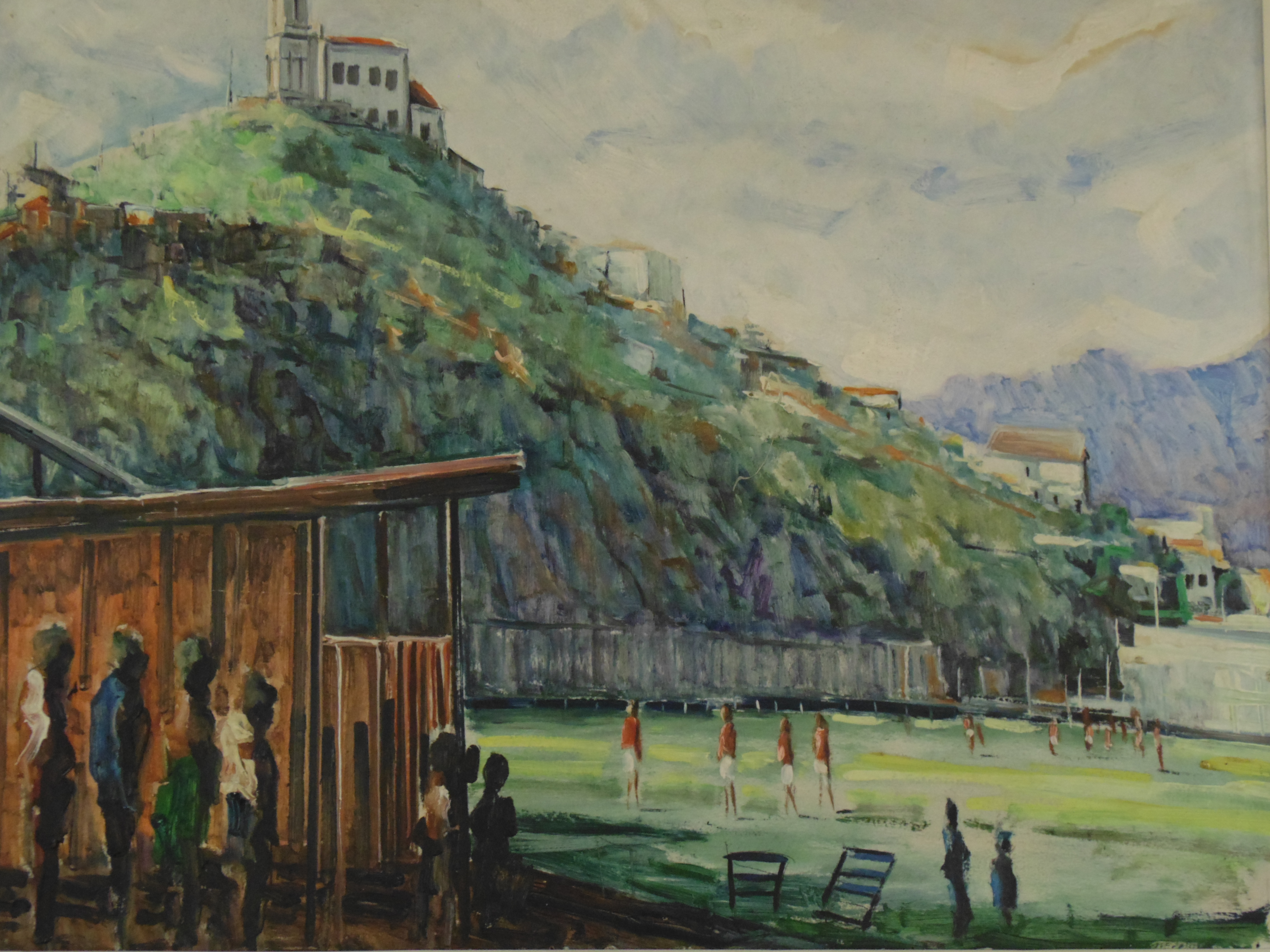 Foto de uma gravura do antigo campo do Andaraí, na zona norte do Rio de Janeiro, hoje Shopping Iguatemi.